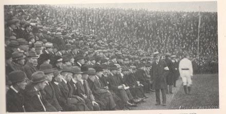 Bokelbergstadion in Monchengladbach